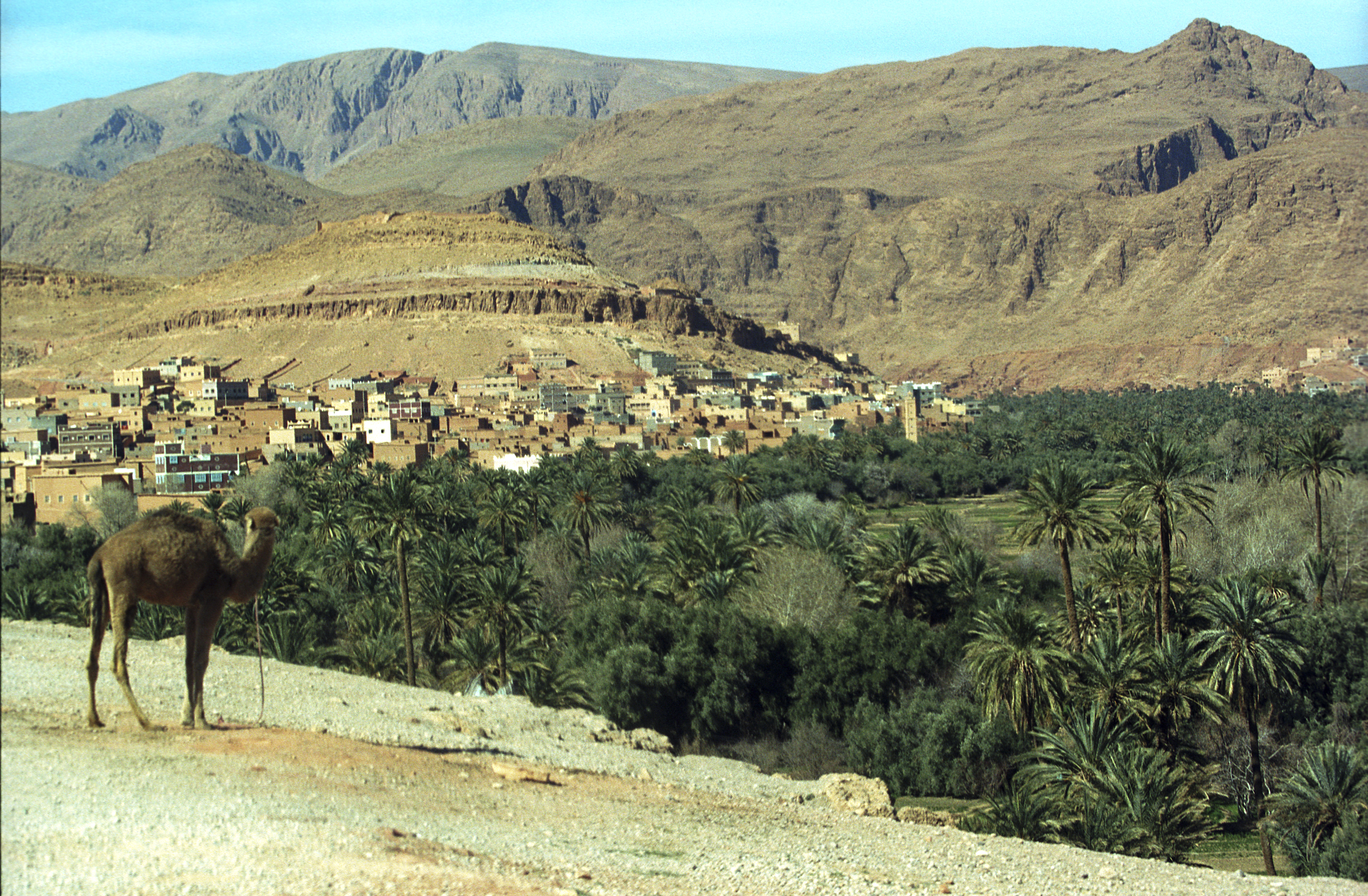 Atlas, Morocco, Dades Valley, Dades river, Boumalne du Dades